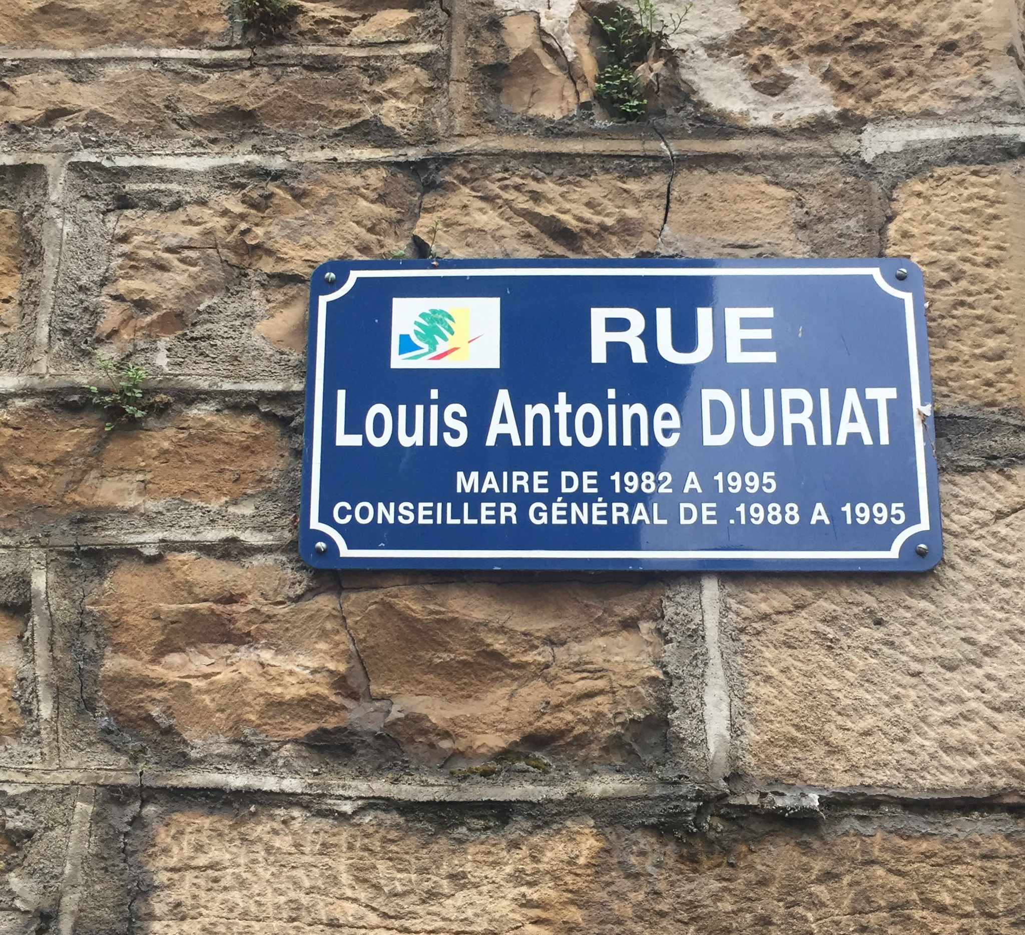 Image de Reyrieux, Ain, France en avril 2017.